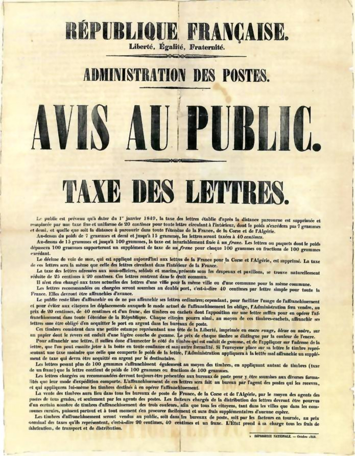 timbres poste France 2e République, réforme postale, tarifs postaux circulaire, affiche